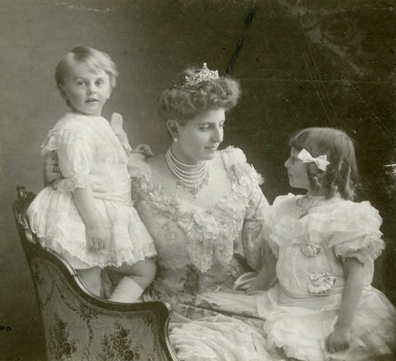 Княгиня Софья Ираклиевна Трубецкая, ур. Багратион-Мухранская (1850–1932)